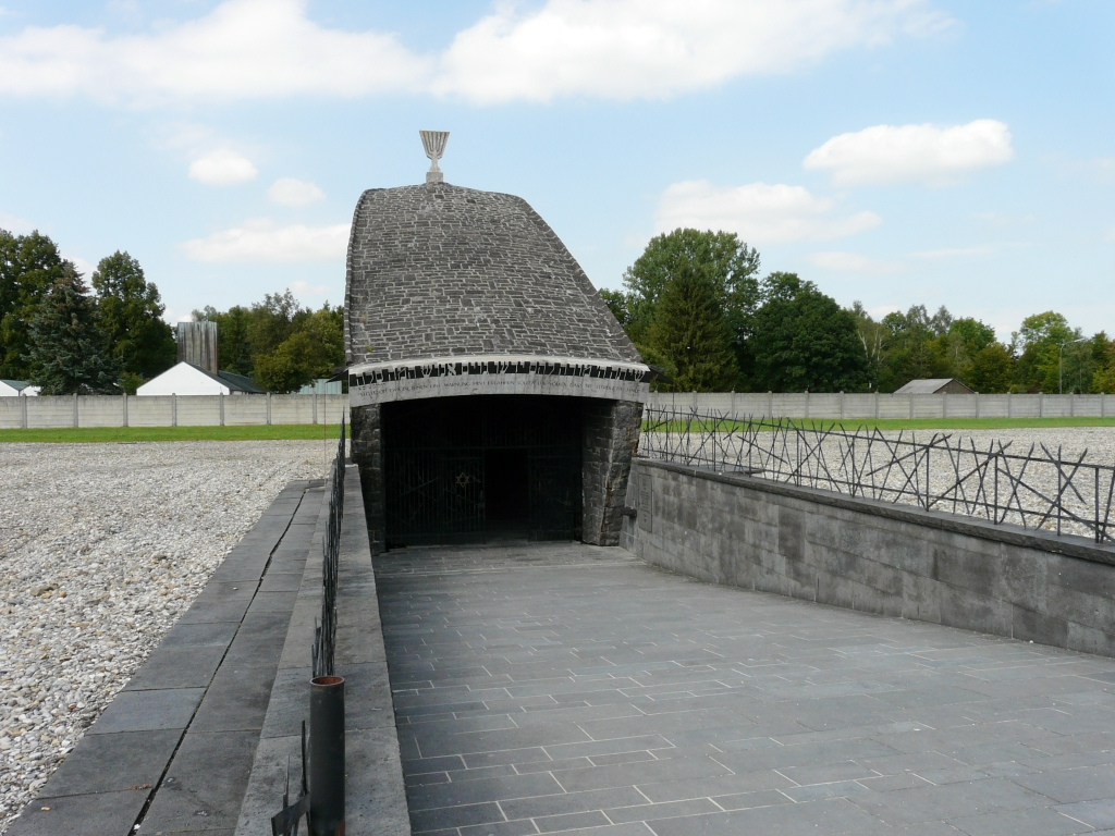 1967 gebaute jüdische Gedenkstätte im Konzentrationslager Dachau